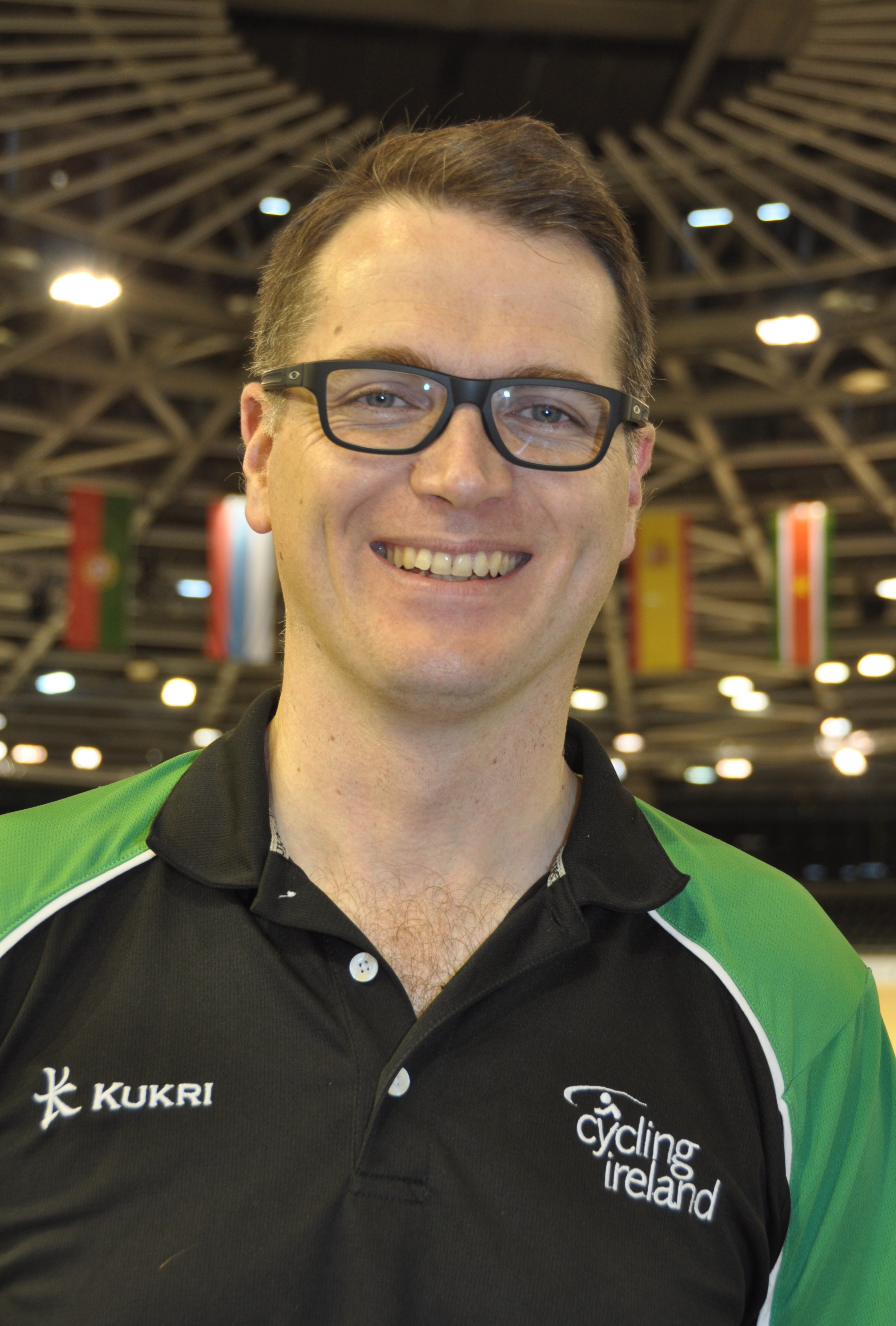 Brian Nugent, irischer Radsporttrainer